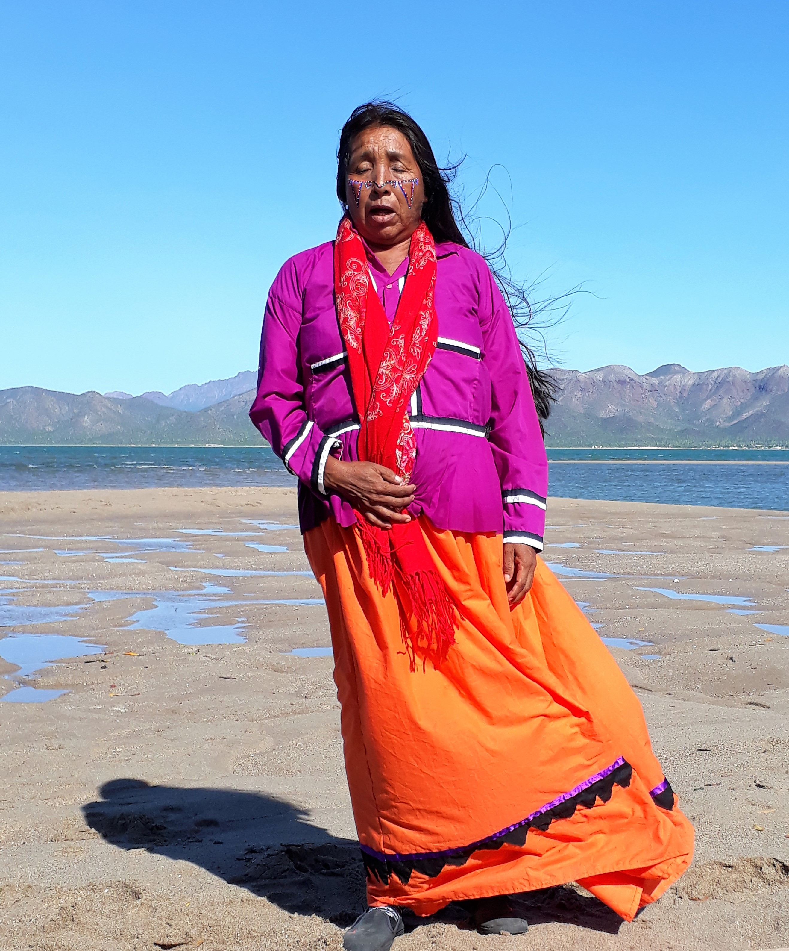 Mujer Comcáac realizando cantos al viento en la Isla Tiburón, al fondo, después del Canal del Infiernillo, se aprecia Punta Chueca, tierras otorgadas por el gobierno de México a la tribu. La imagen incluye el sitio RAMSAR Canal del Infiernillo, la localidad de Punta Chueca y fue tomada en la Área Natural Protegida Isla del Tiburón This photo has been taken in the country: Mexico